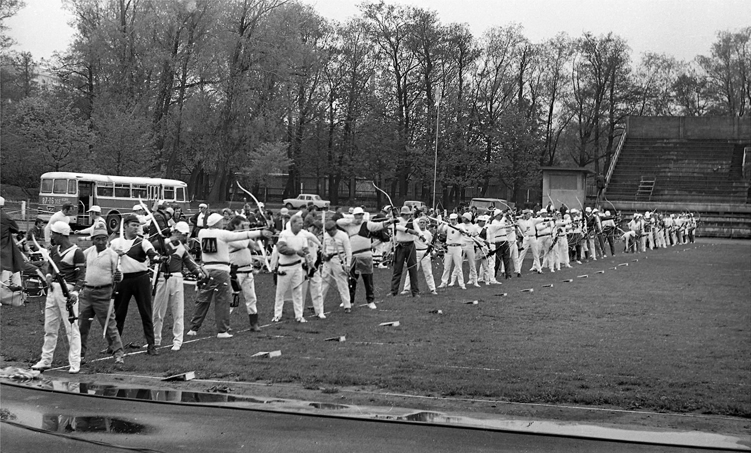 Vibuspordi võistlused, neljateistkümne riigi esindajad kunagise ETKVLi staadionil Kadriorus 1972.